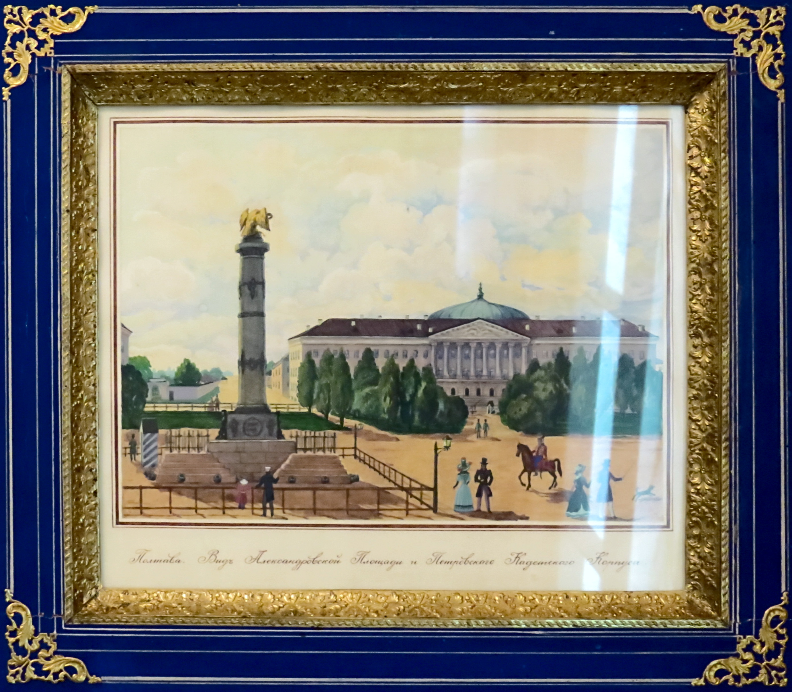 Експозиція Київського музея театрального, музичного та кіномистецтва України. Полтава. Вид на Олександрівську площу та Петрівський кадетський корпус. Малюнок XIX ст.